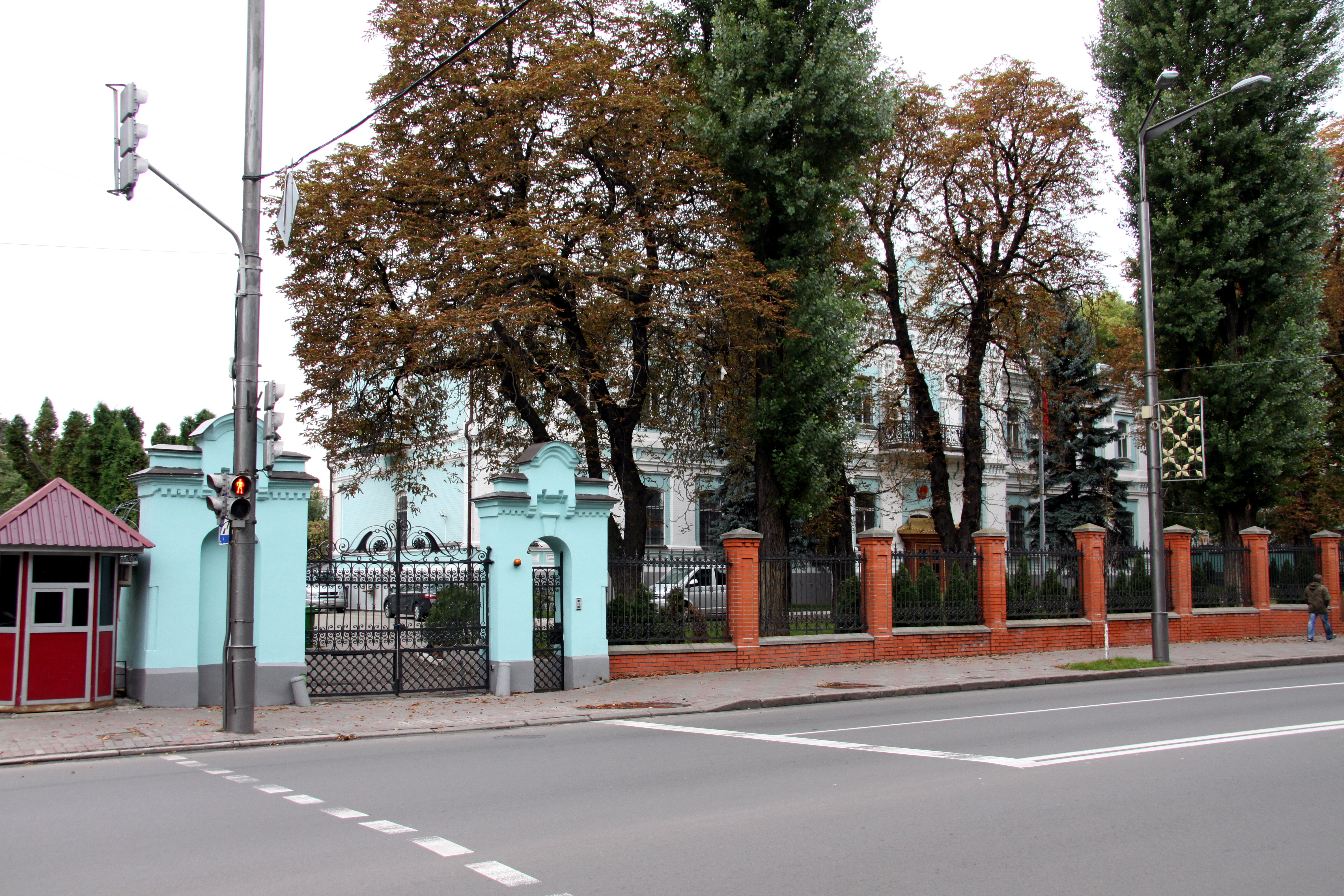 Будинок командувача військ Київського військового округу, де жили: у 1889–1903 рр. Драгомиров М. І., генерал-губернатор, українофіл, член Державної ради; радянські діячі: у 1935-37 рр.- Якір Й. Е., у 1937–1938 рр. — Федько І. Ф.; Жуков Г. К., воєначальник, Київ, Грушевського Михайла вул., 32